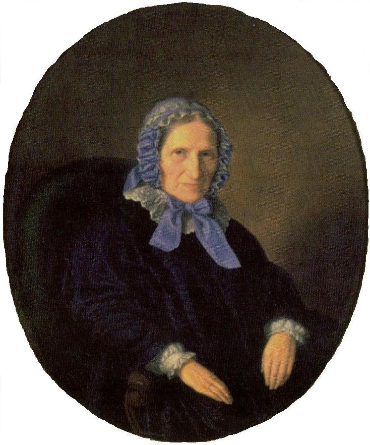 Betty Heine (born as Peira van Geldern) (1771-1859), Heinrich Heine's mother.